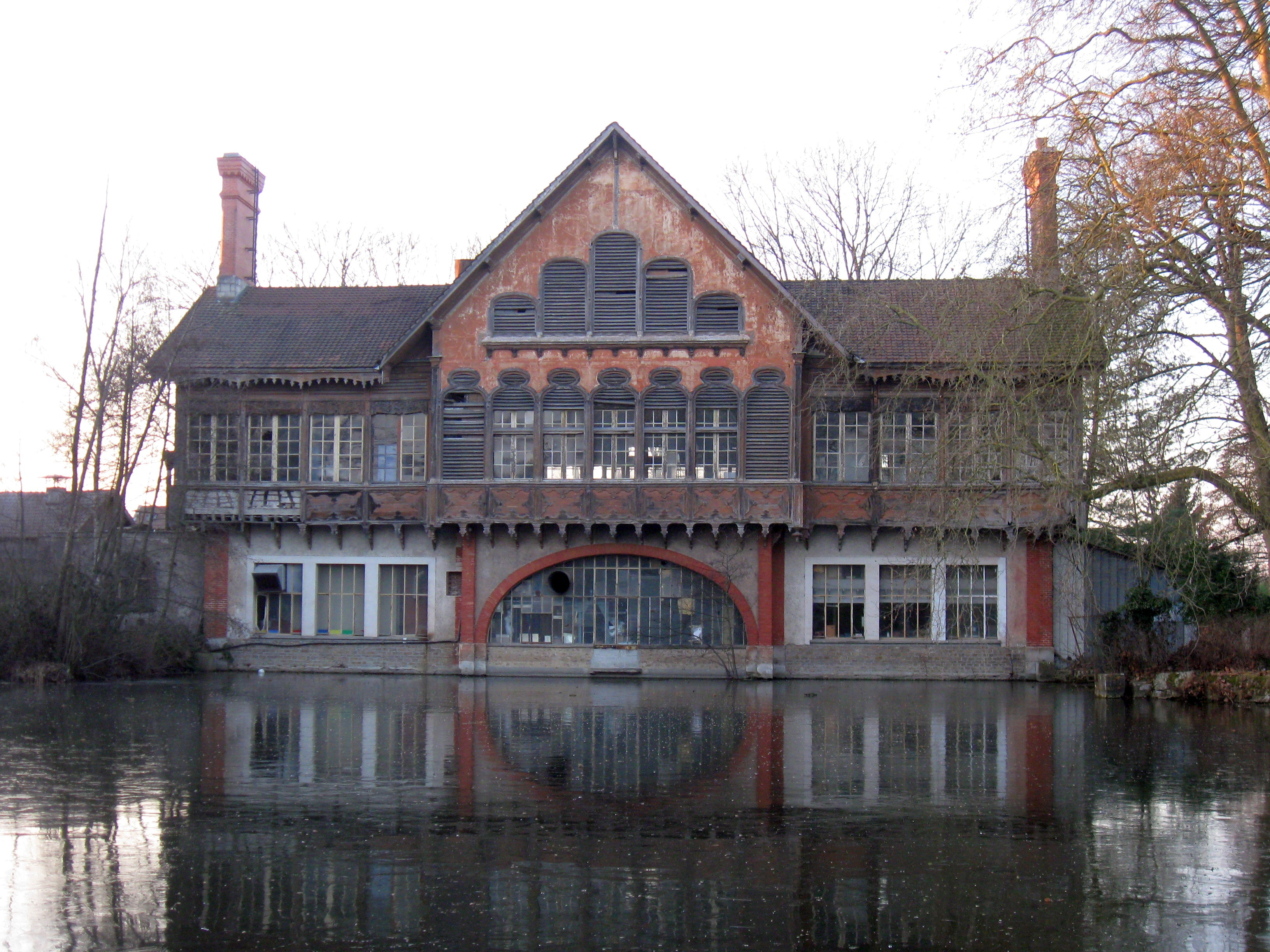 Ancienne buanderie de l'ancien domaine du château Rothschild. (Seine-et-Marne, région Île-de-France).